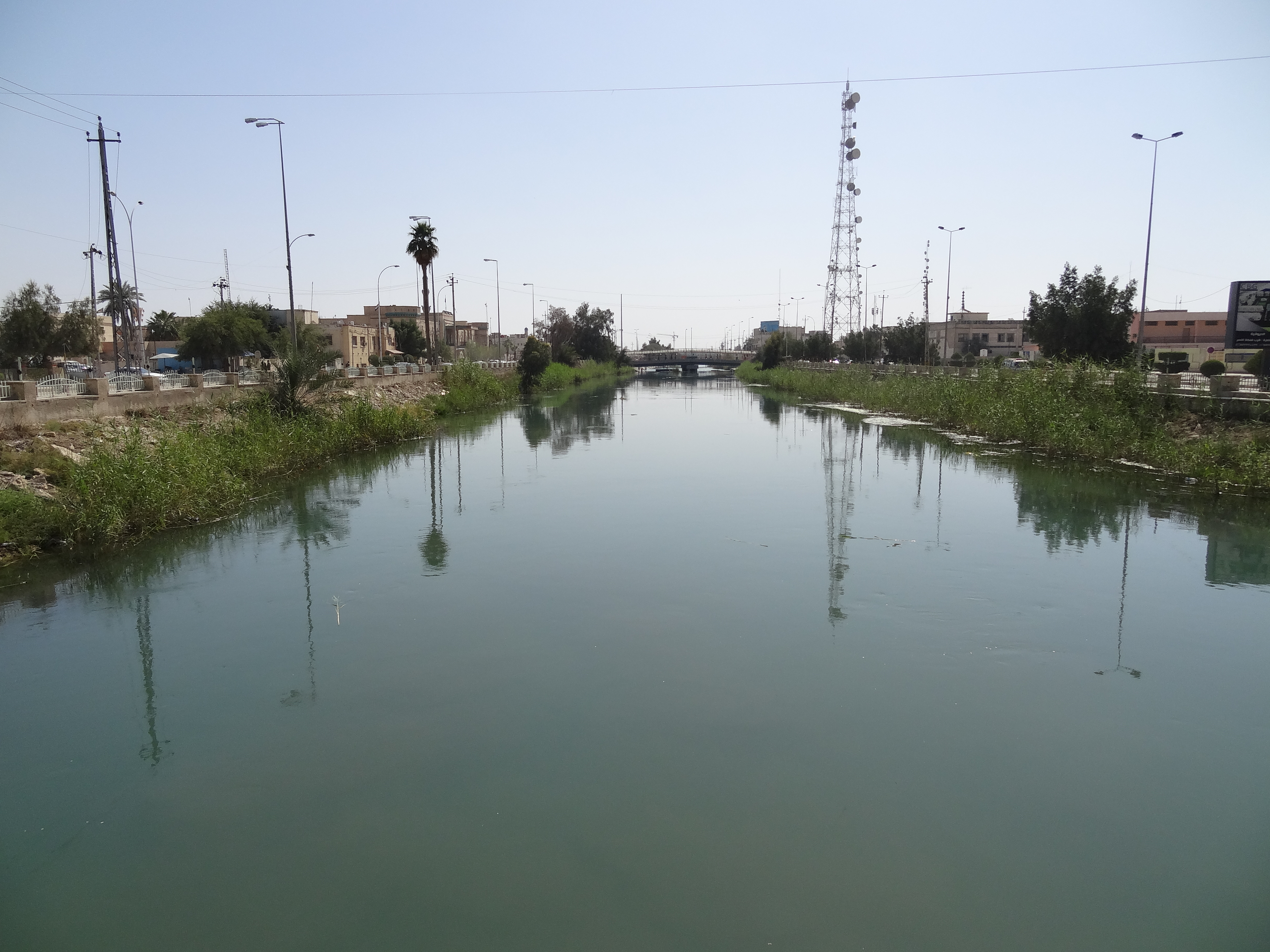 Hello I Sajjad al-Khafaji, from Iraq live in the city of Diwaniyah, the pictures of my city where I live and where the image of the river that passes through the city of Diwaniyah, the people of Diwaniya he calls "the Shatt al-Diwaniya"الشجرة التين والأغنام